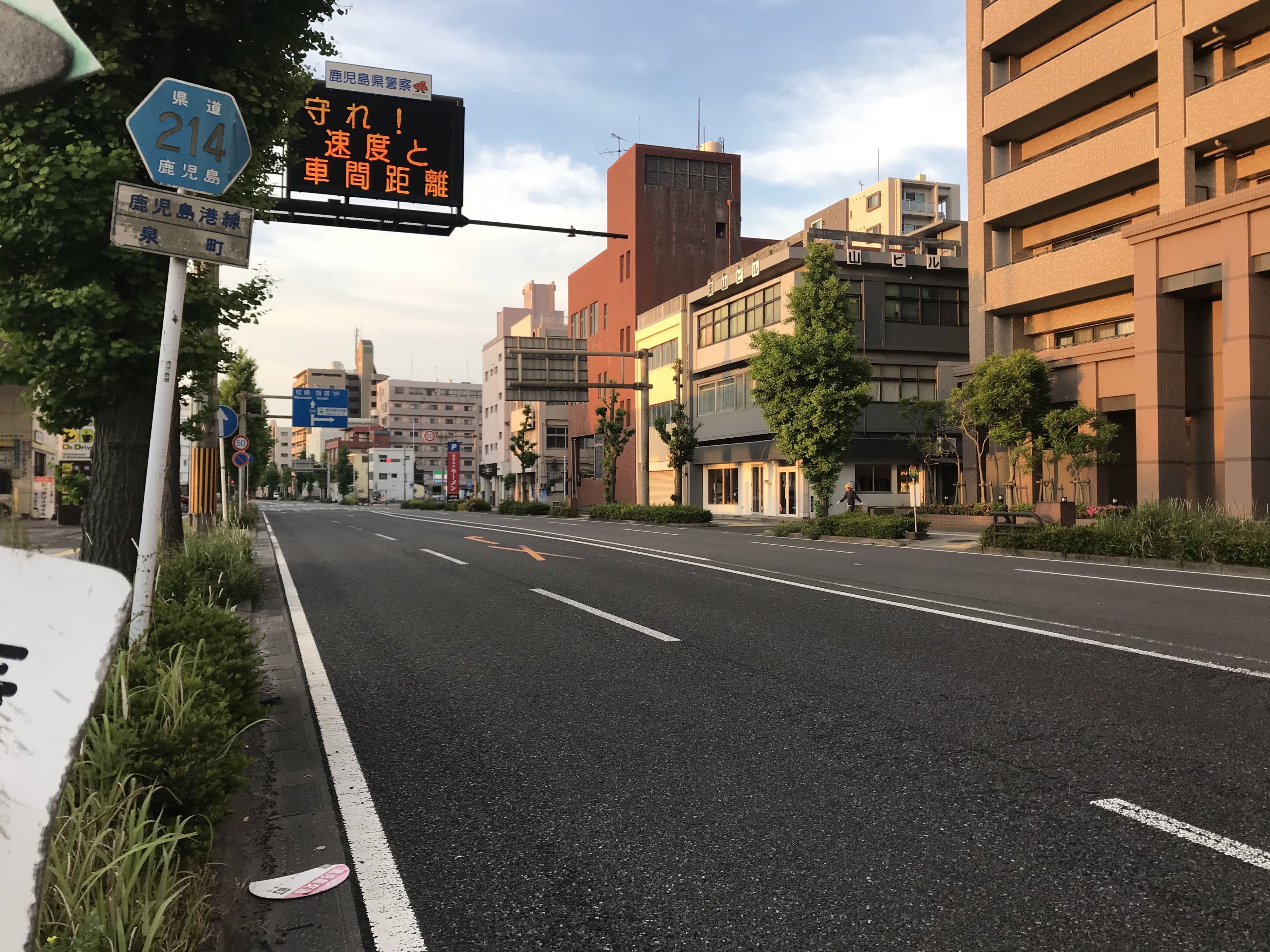 十島村役場付近の鹿児島県道214号